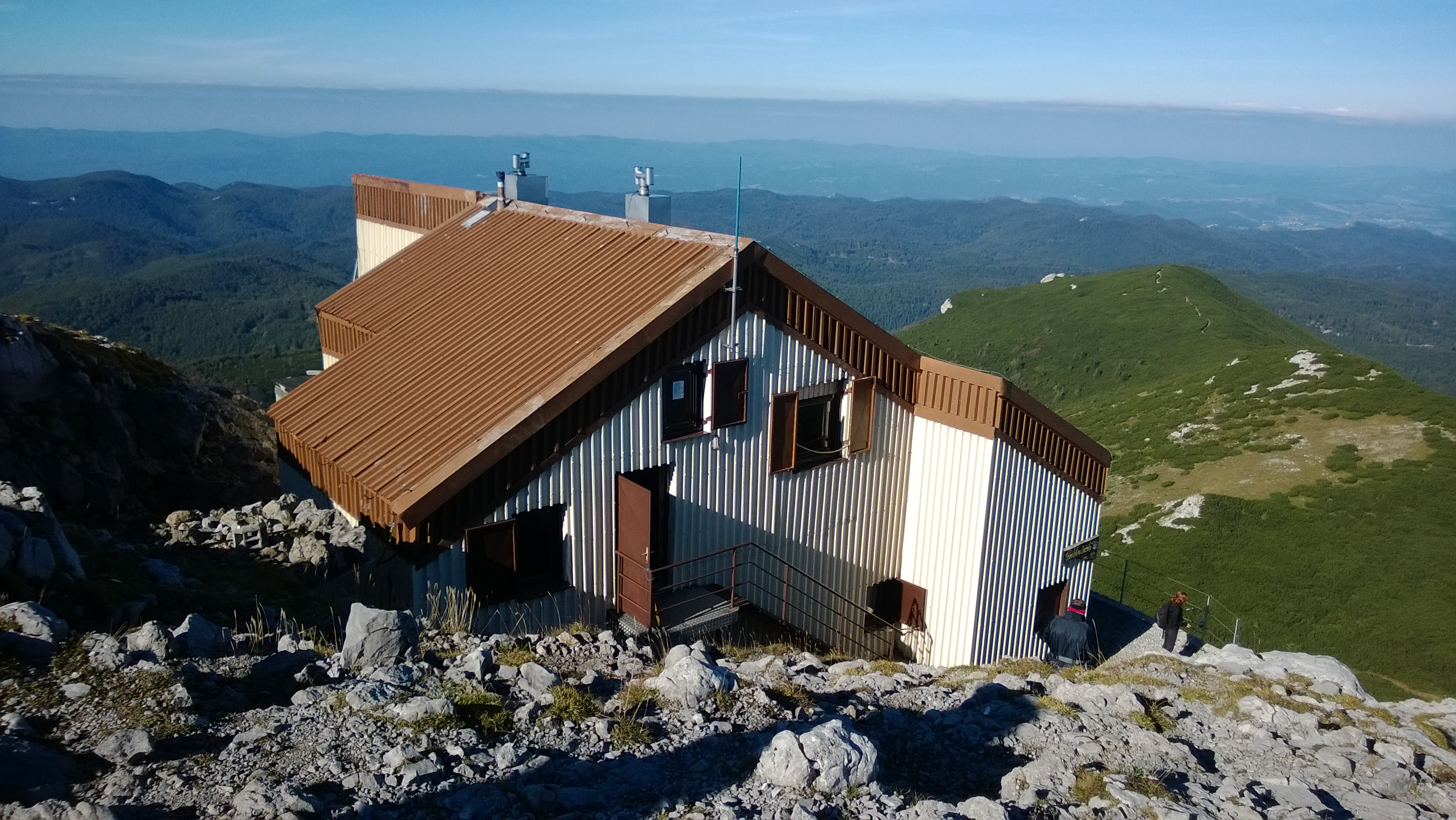 Ogo Wintendo Phone_20130922_004